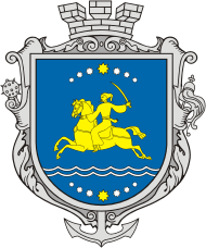 Герб міста Нікополь